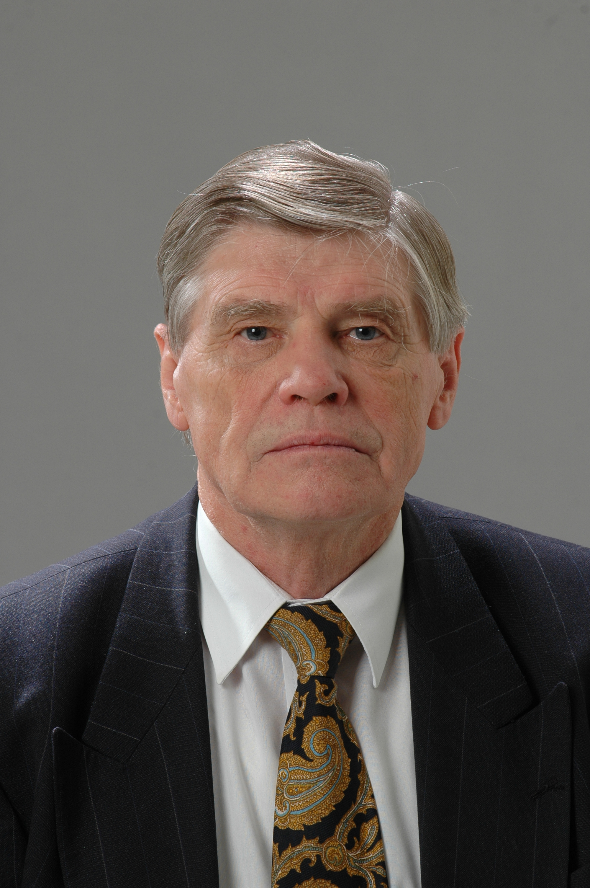 Foto: Saeima